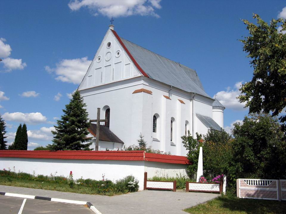 Беларуская (тарашкевіца): Чарнаўчыцы